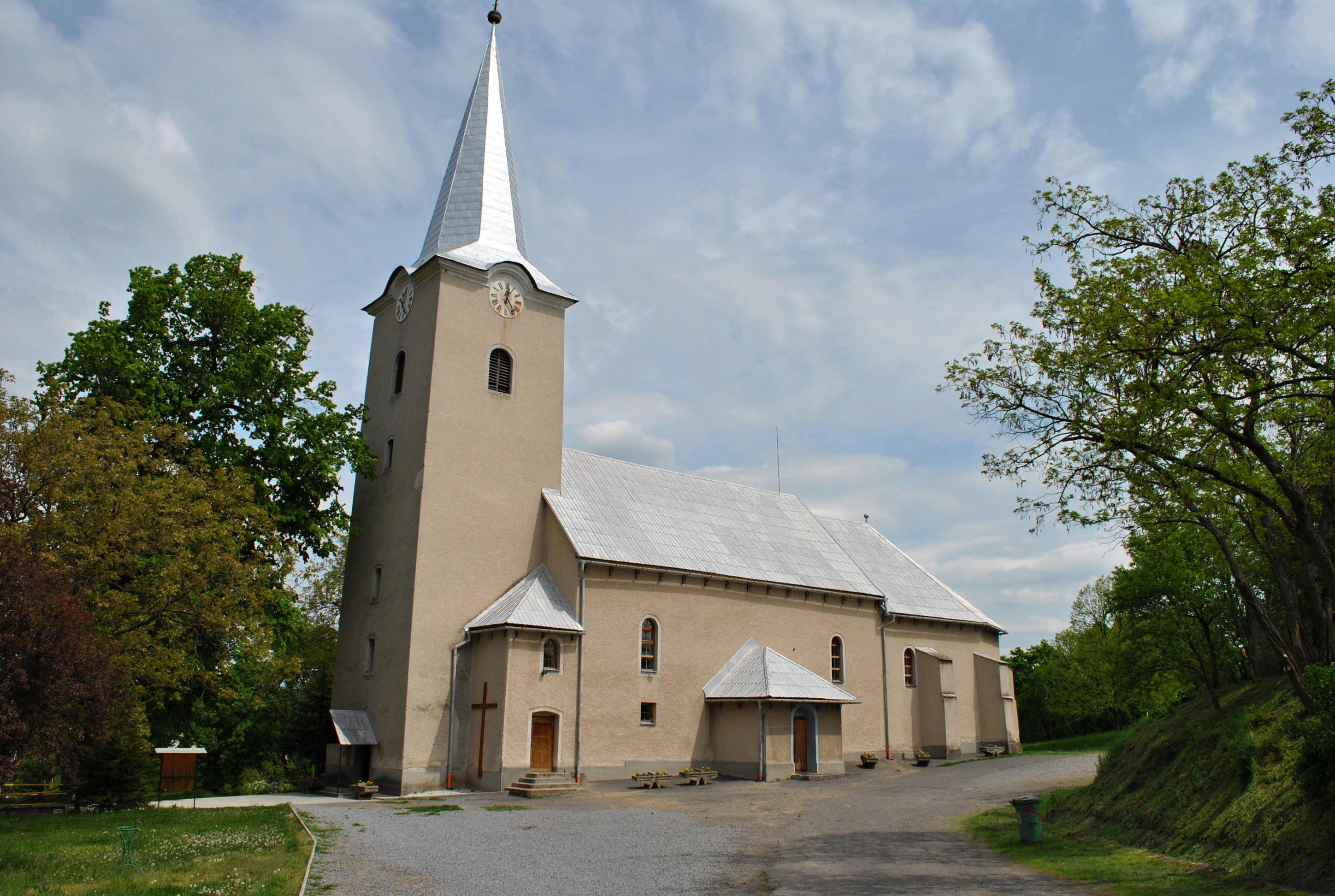 Kostol